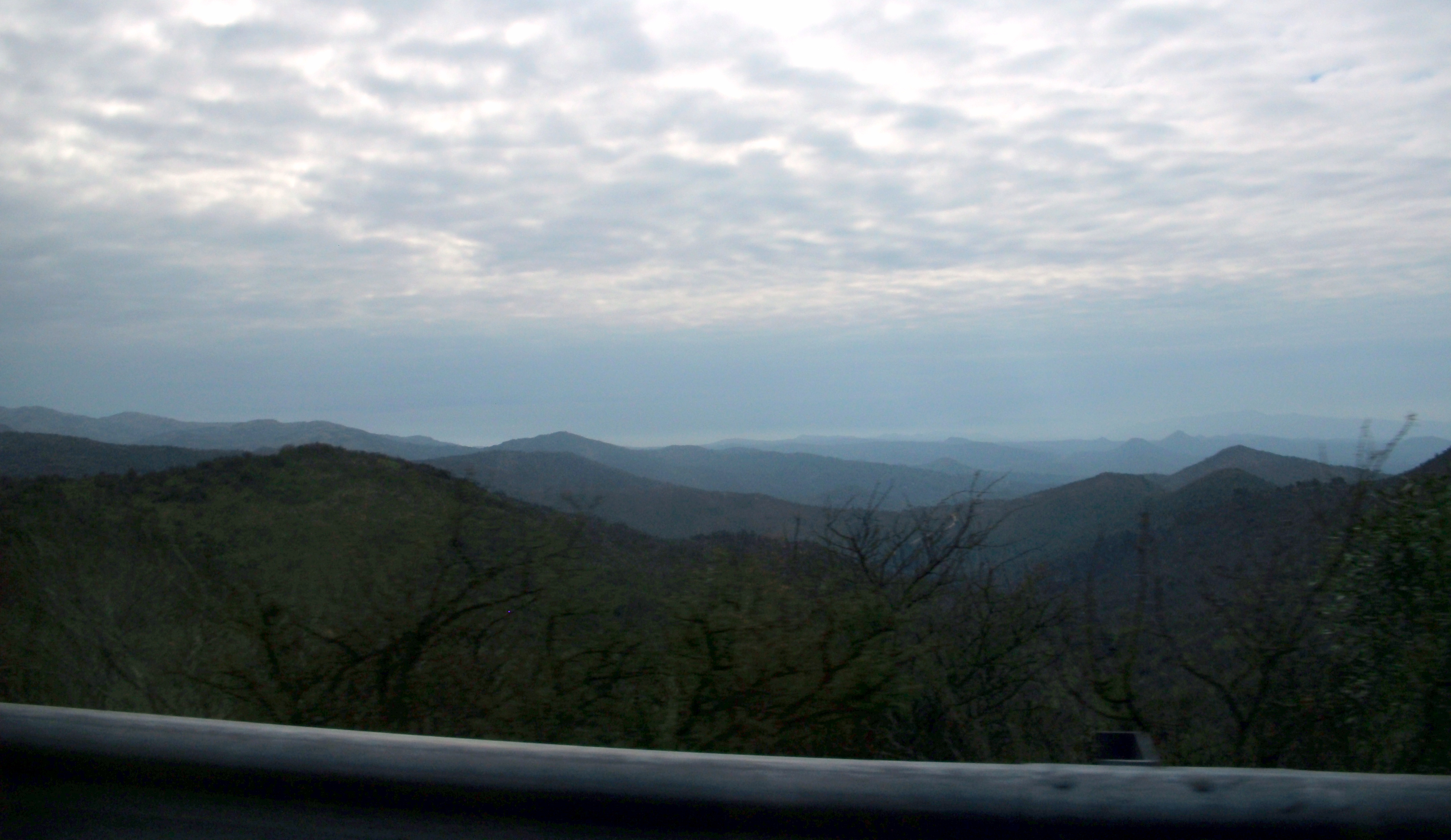 Paisaje dominante de la ruta en su pendiente